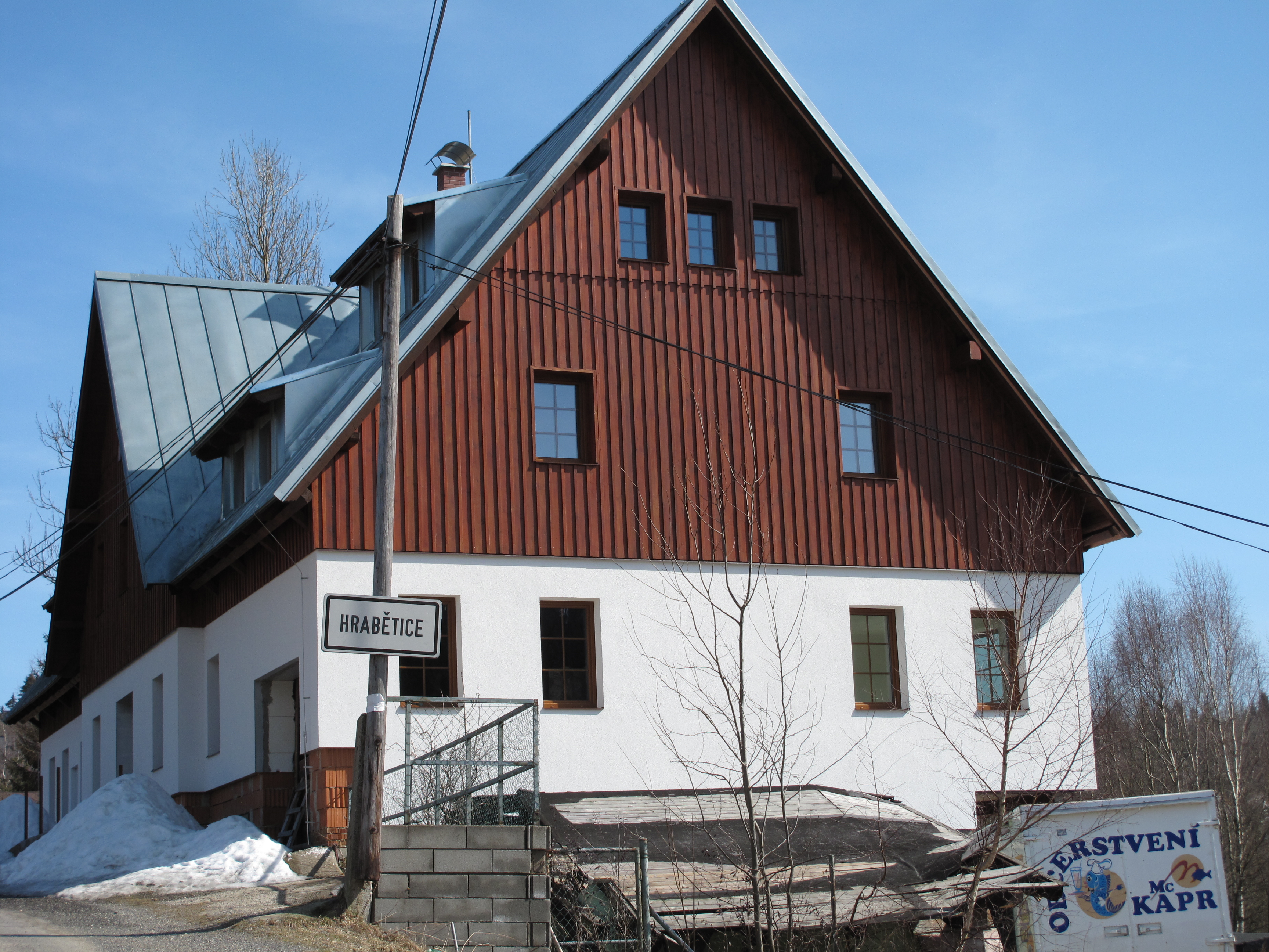 Chalupa v Hraběticích. Okres Jablonec nad Nisou, Česká republika.